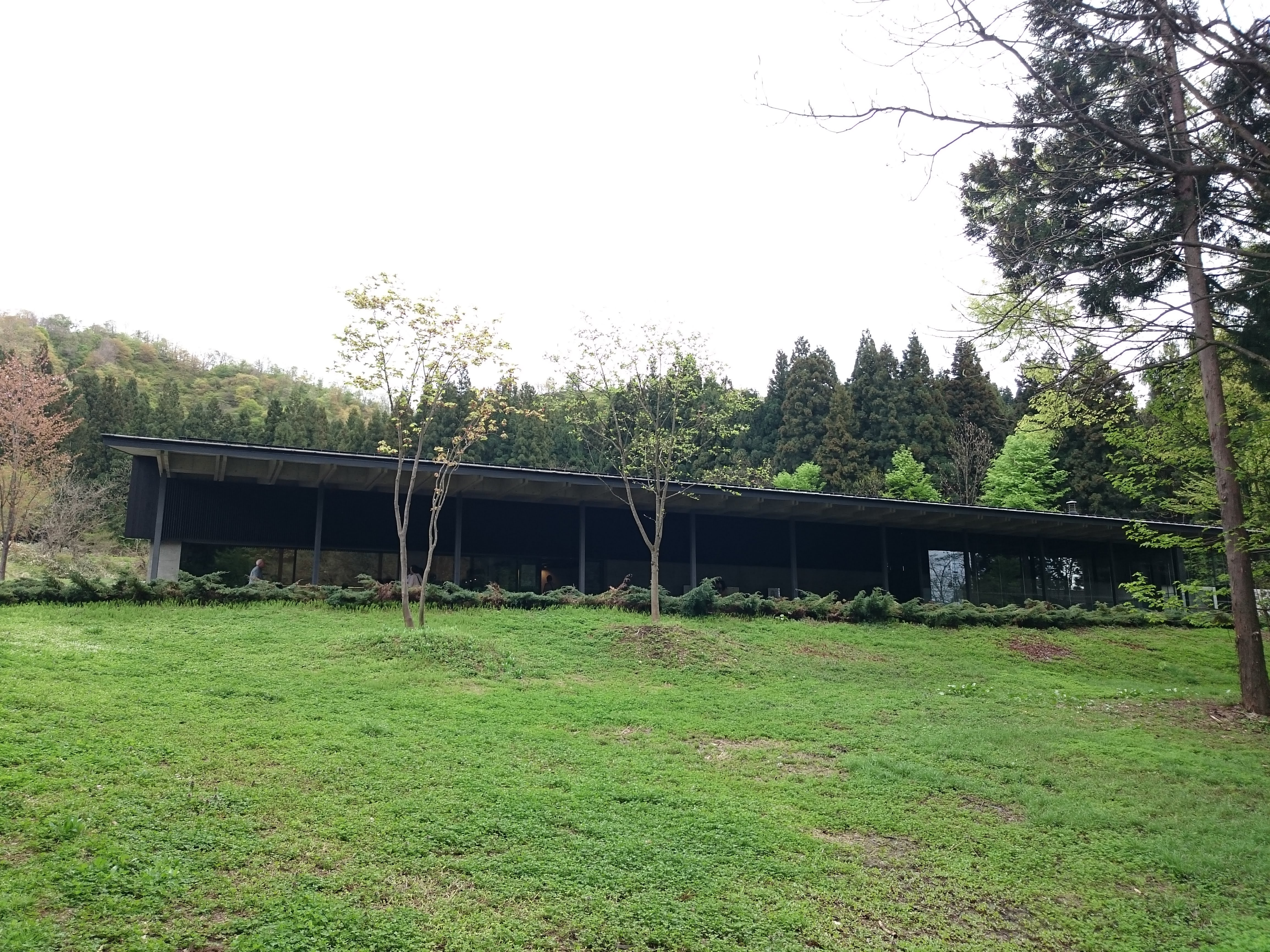 八海山雪室の外観